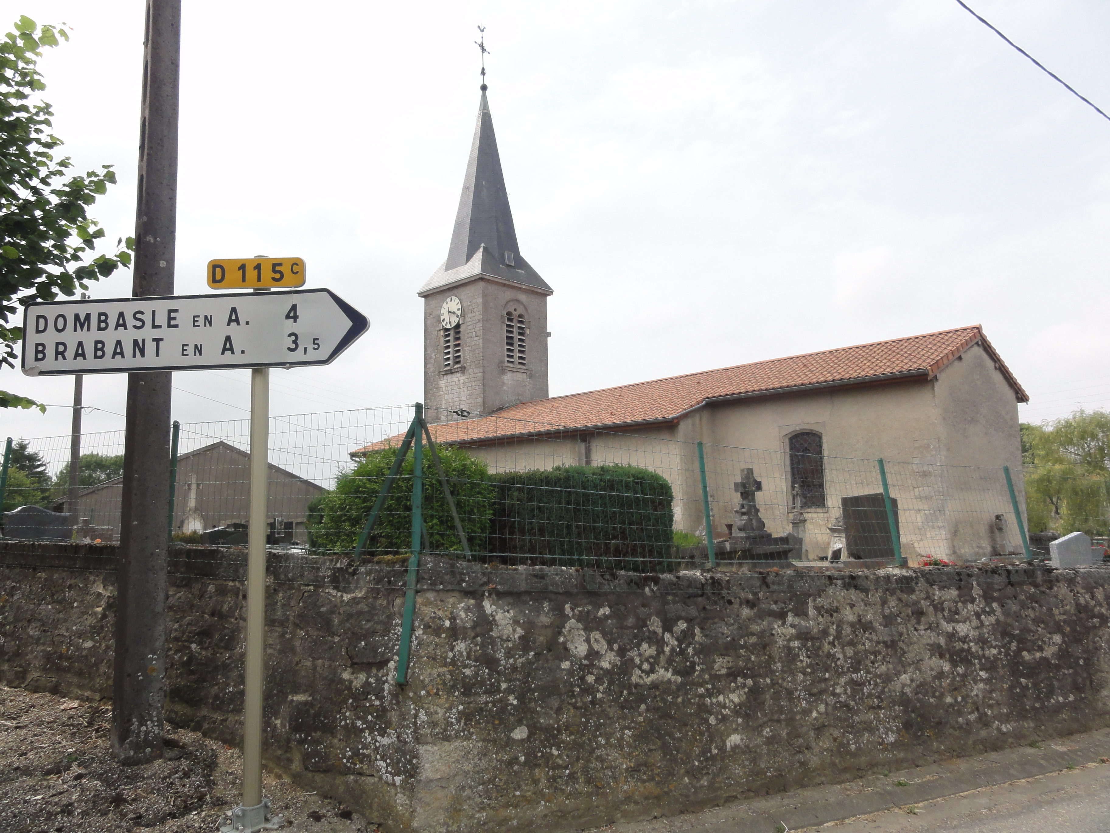 Brocourt-en-Argonne (Meuse) église